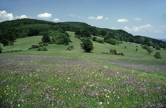 Rhön (Germany). Photographer: Mg-k. Source: M. Klüber Fotografie